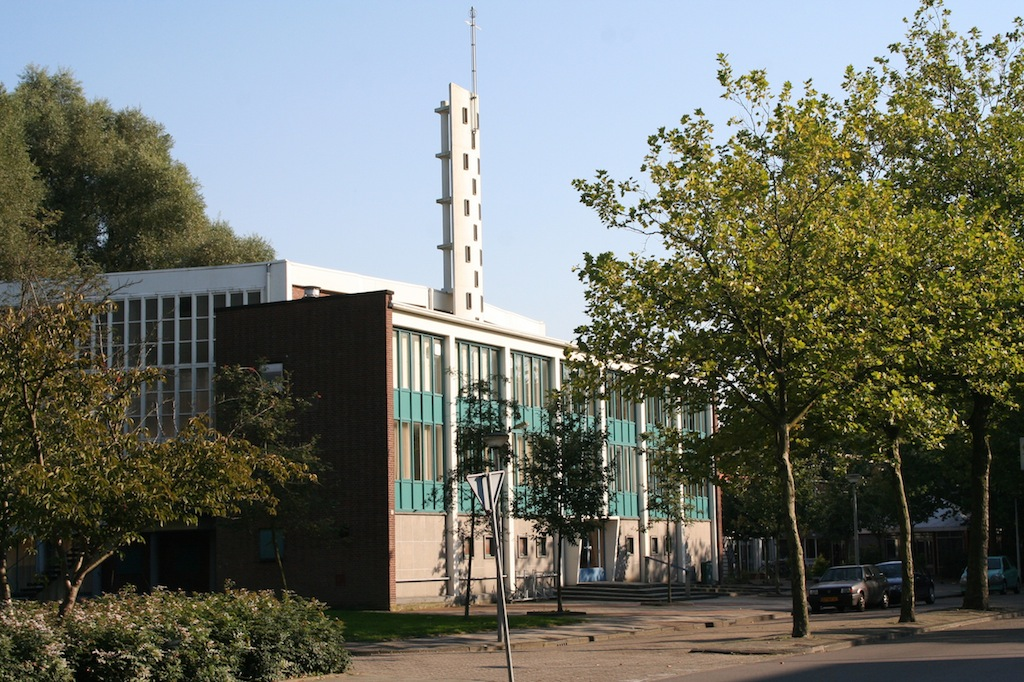 Sionskerk (Geuzenveld), 1957; Architect: C. v.d. Bom. Gereformeerde Kerk. Buiten gebruik als kerk in 2006; verbouwd tot moskee in 2011. Foto: Erik Swierstra.